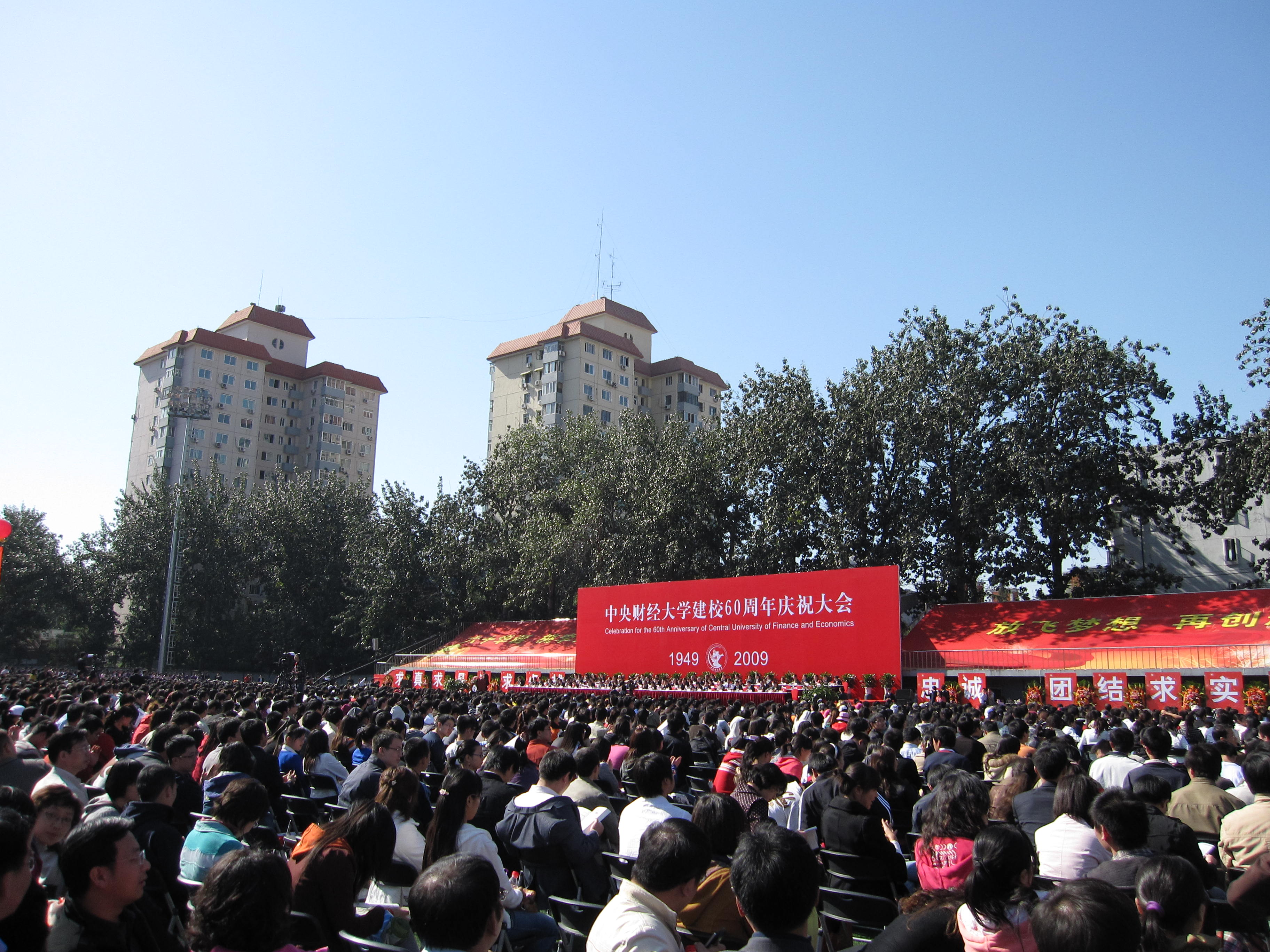 中文（中国大陆）: 中央财经大学60周年校庆大会